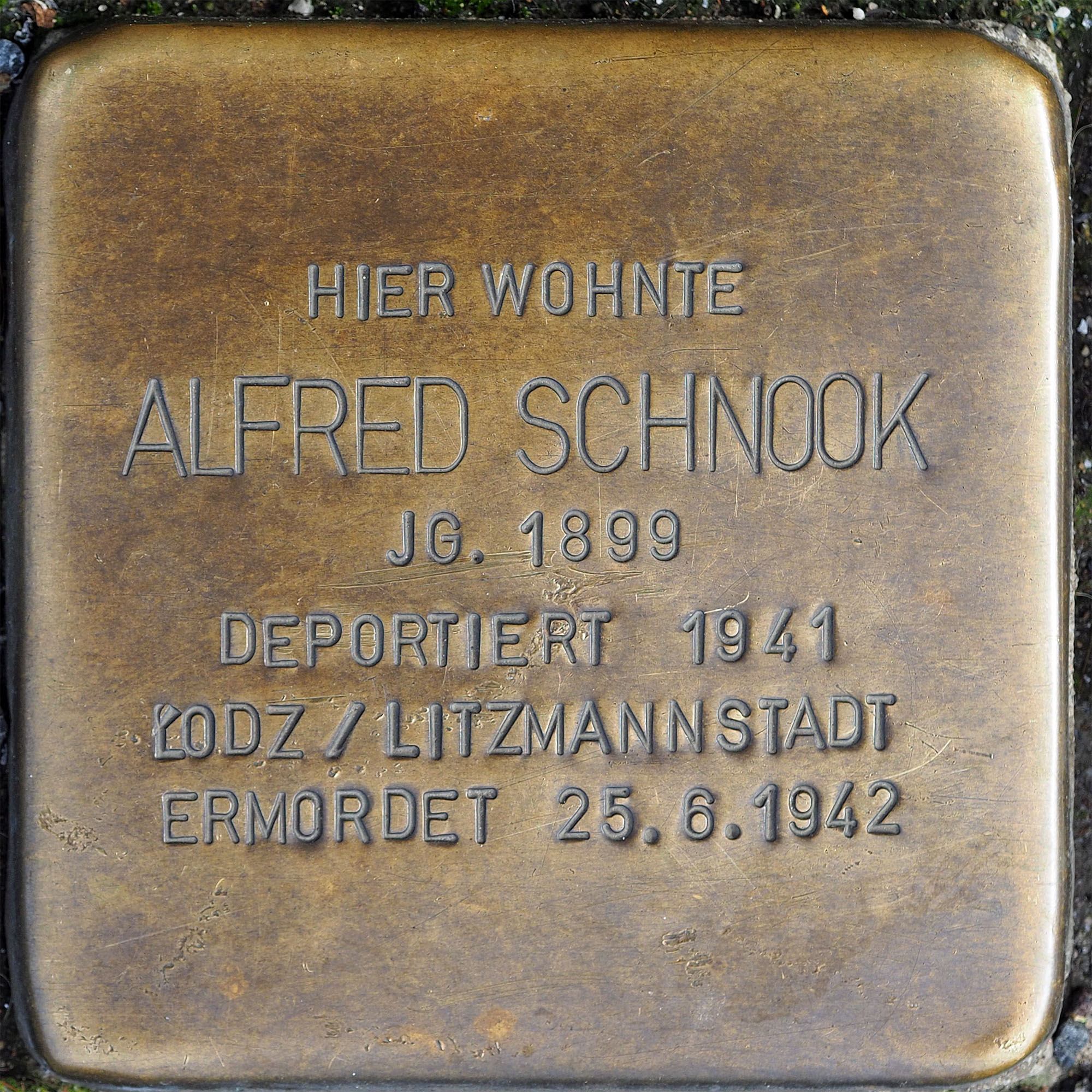 Stolpersteine MG: Schnook, Alfred